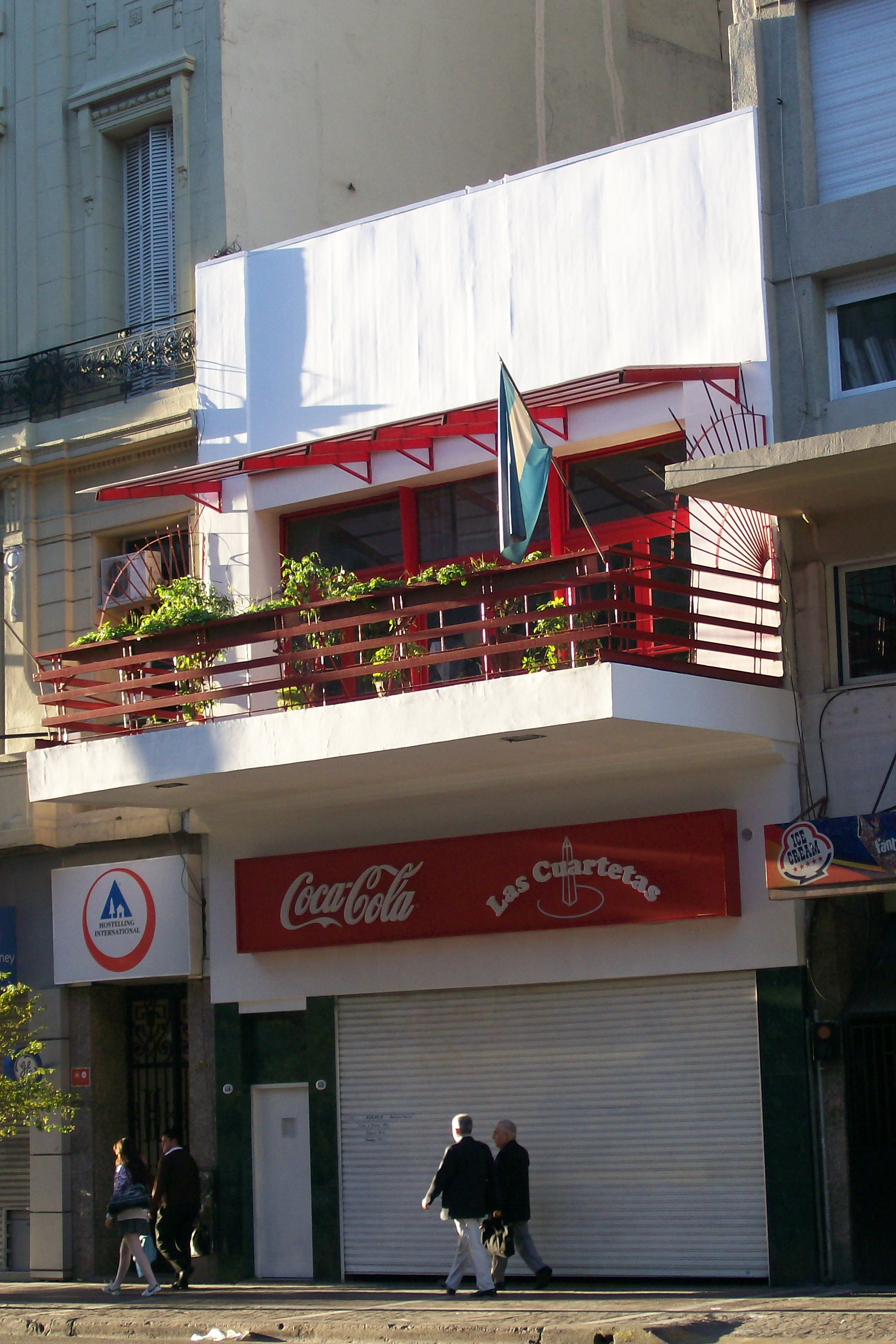 Pizzería Las Cuartetas